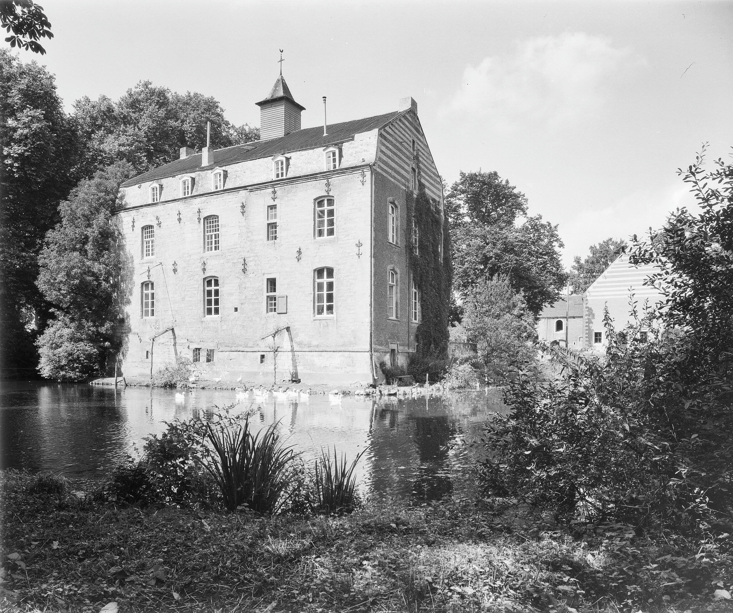 Huis Puth: exterieur naar het noord-westen